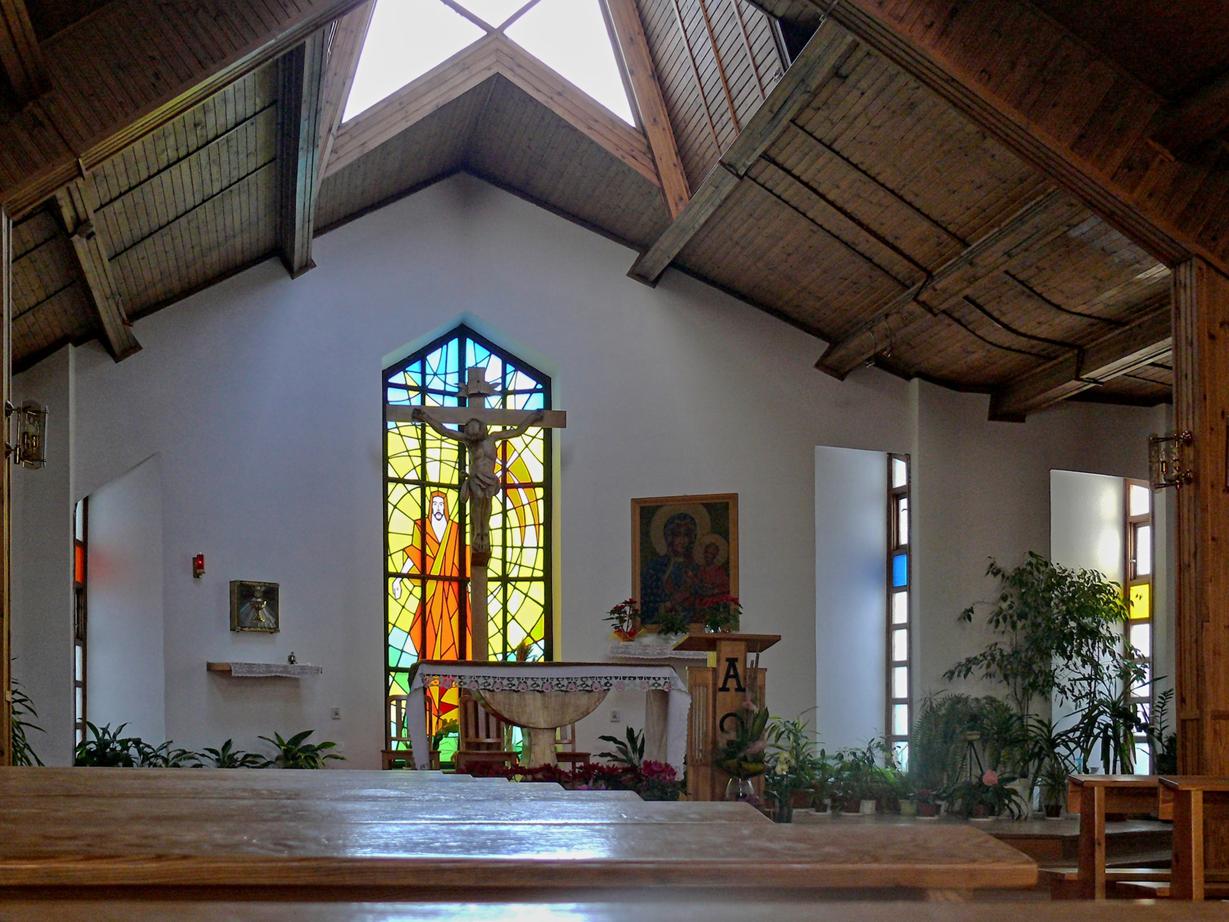 Wnętrze kaplicy w Państwowym Szpitalu Klinicznym w Lublinie, ul. Jaczewskiego.